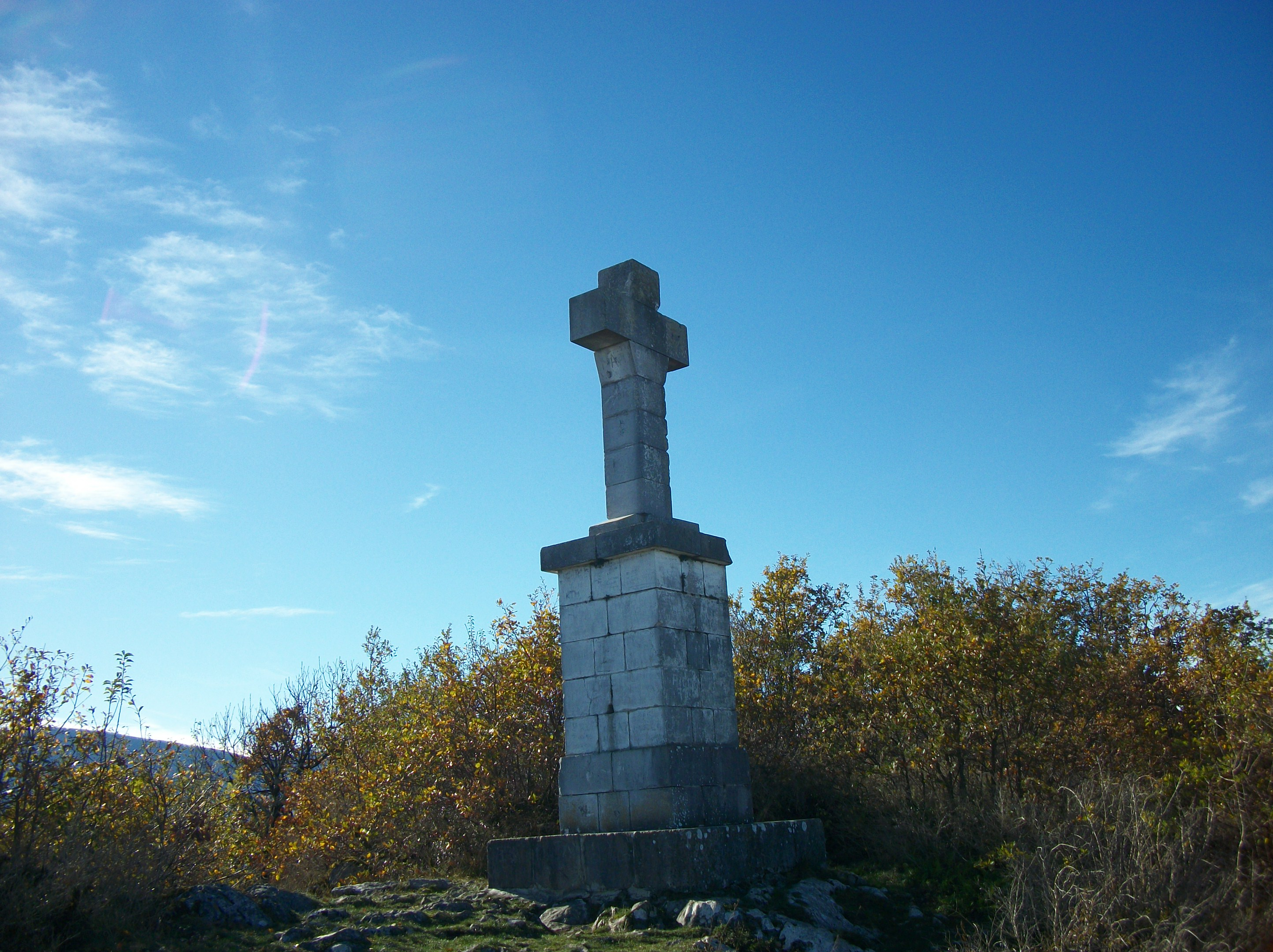 Croix du Picon à 630 m